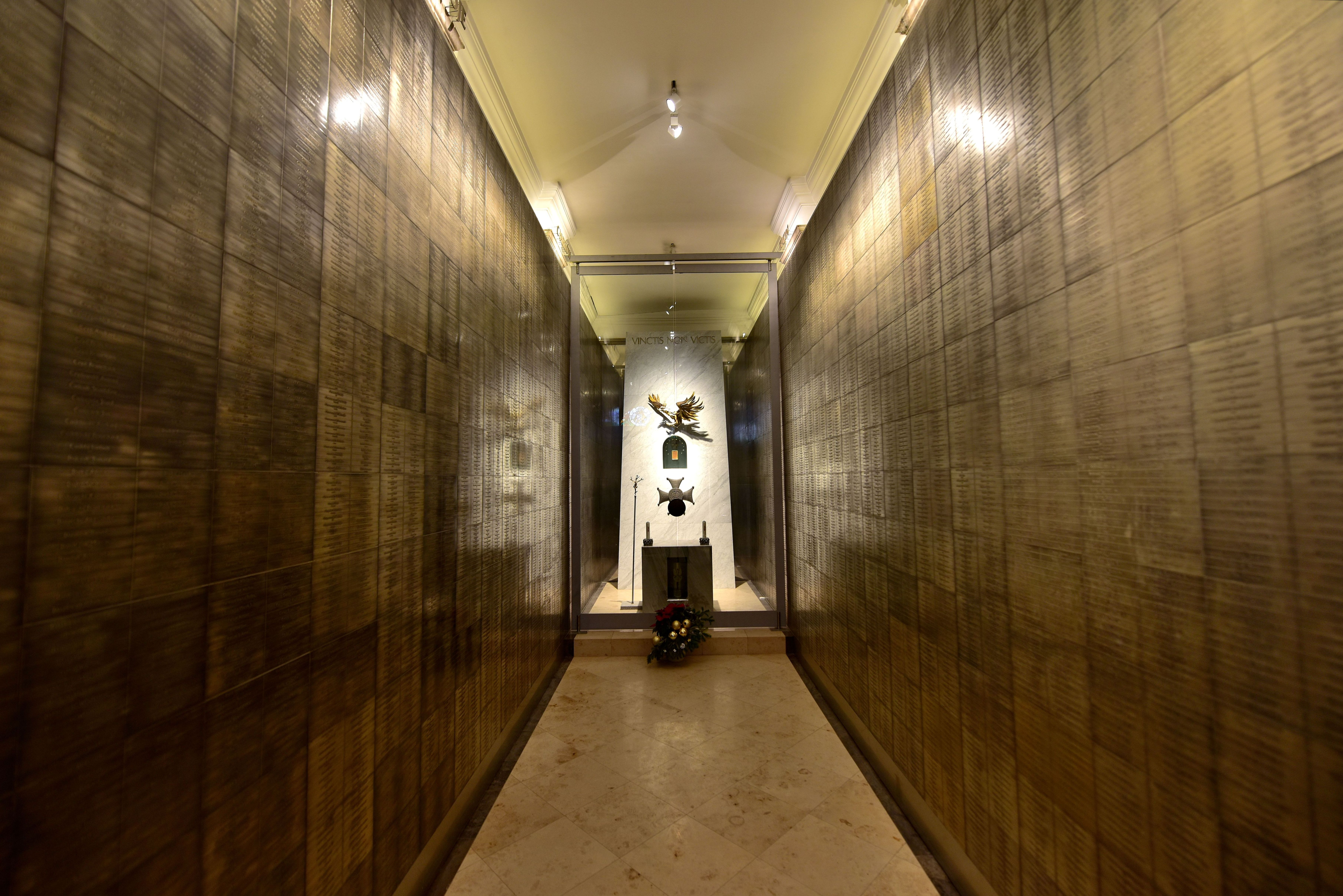 Kaplica Katyńska w katedrze polowej Wojska Polskiego w Warszawie